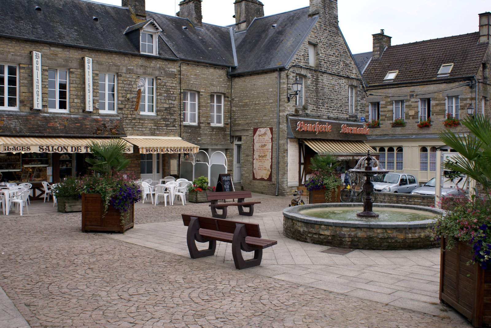 Centre-ville de Clécy dans le Calvados